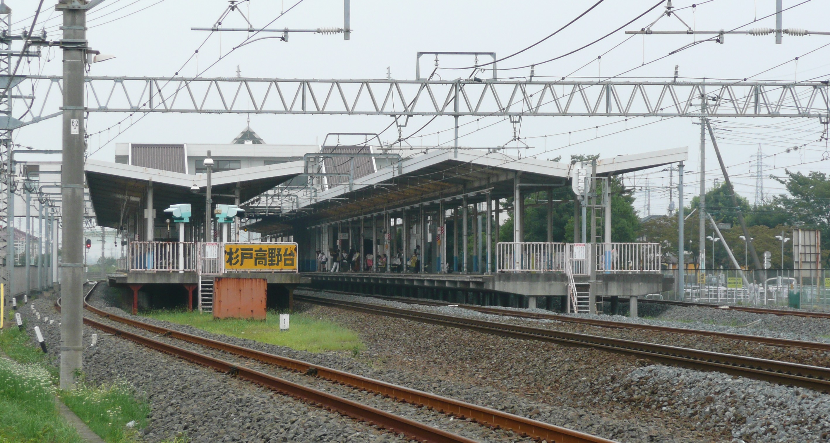 杉戸高野台駅ホーム